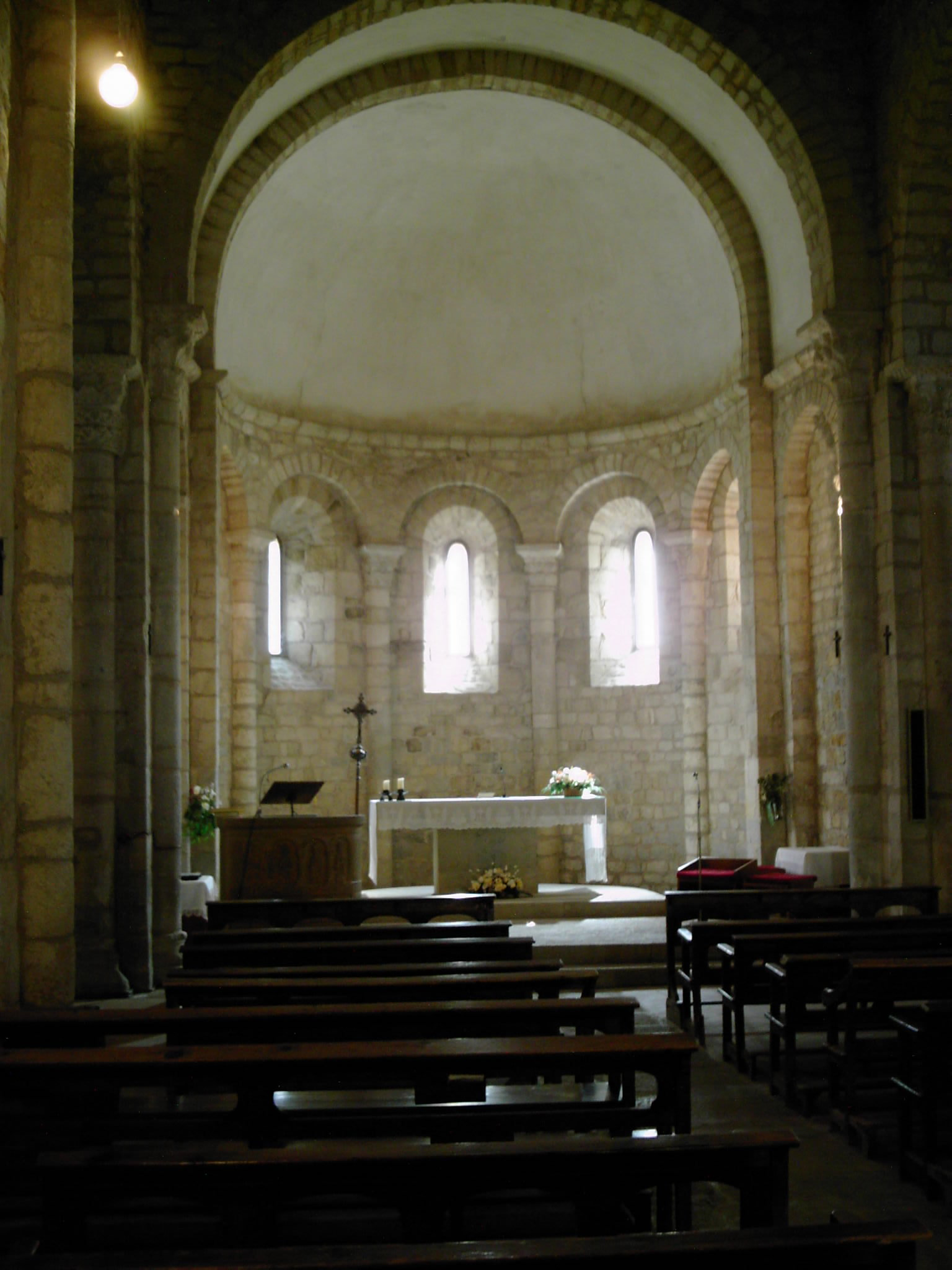 église de St Miquel de Fluvià (Alt Empordà)